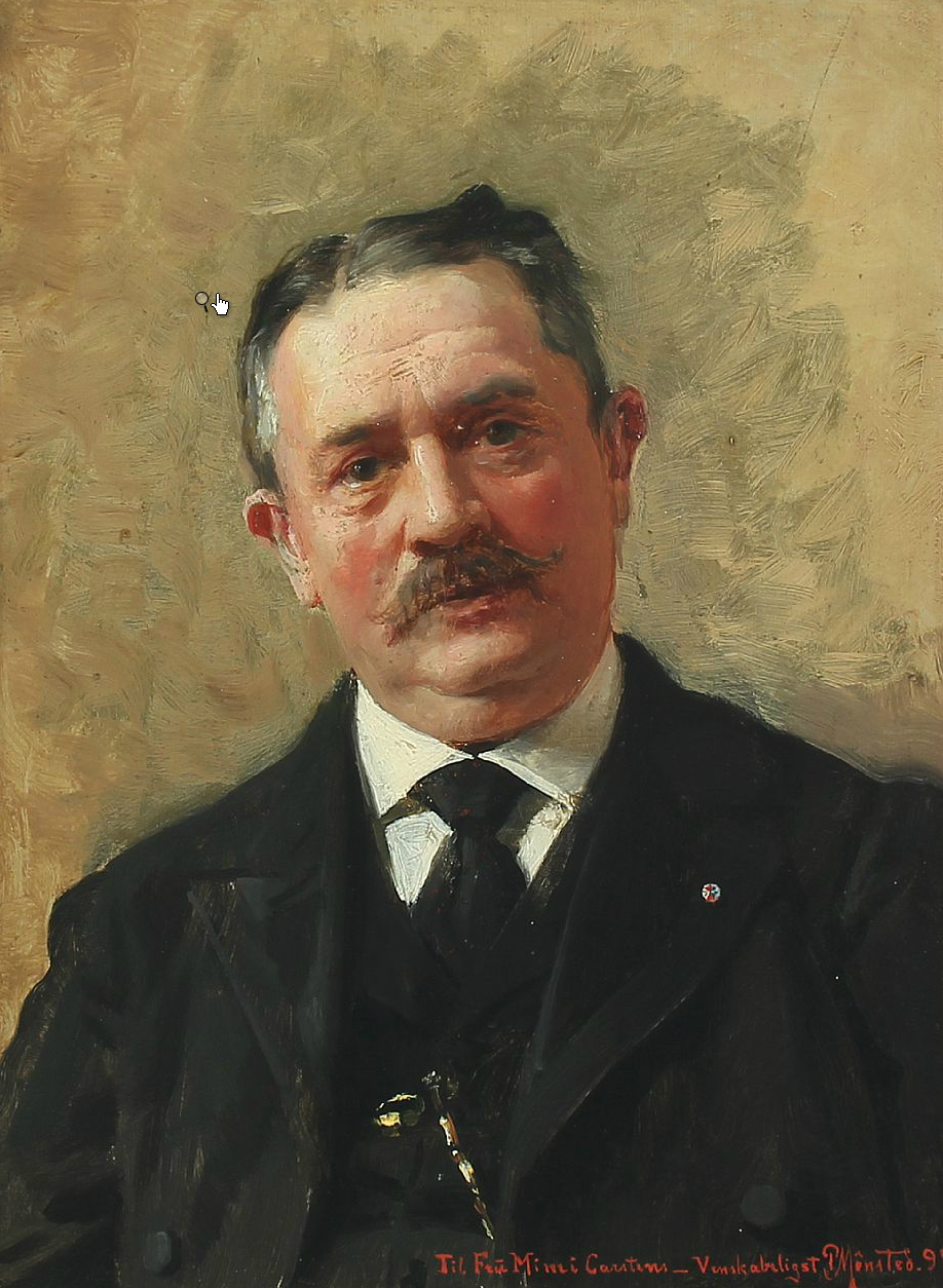 Portræt at redaktør Carl Carstensen, med dedikation